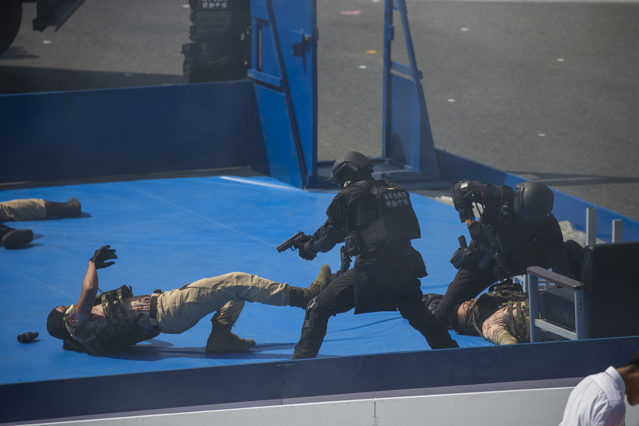 10.10 總統出席「中華民國中樞暨各界慶祝108年國慶大會」